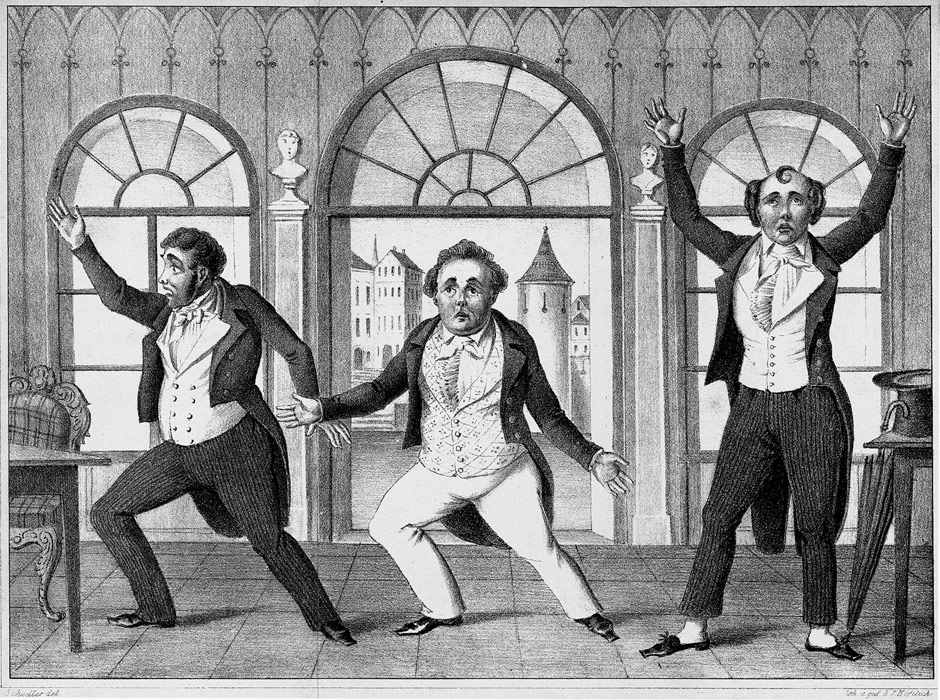 Titelbild aus: Johann Nestroy: Unverhofft. Posse mit Gesang, Wien, Wallishausser, 1849 (EA 23. Juni 1845)